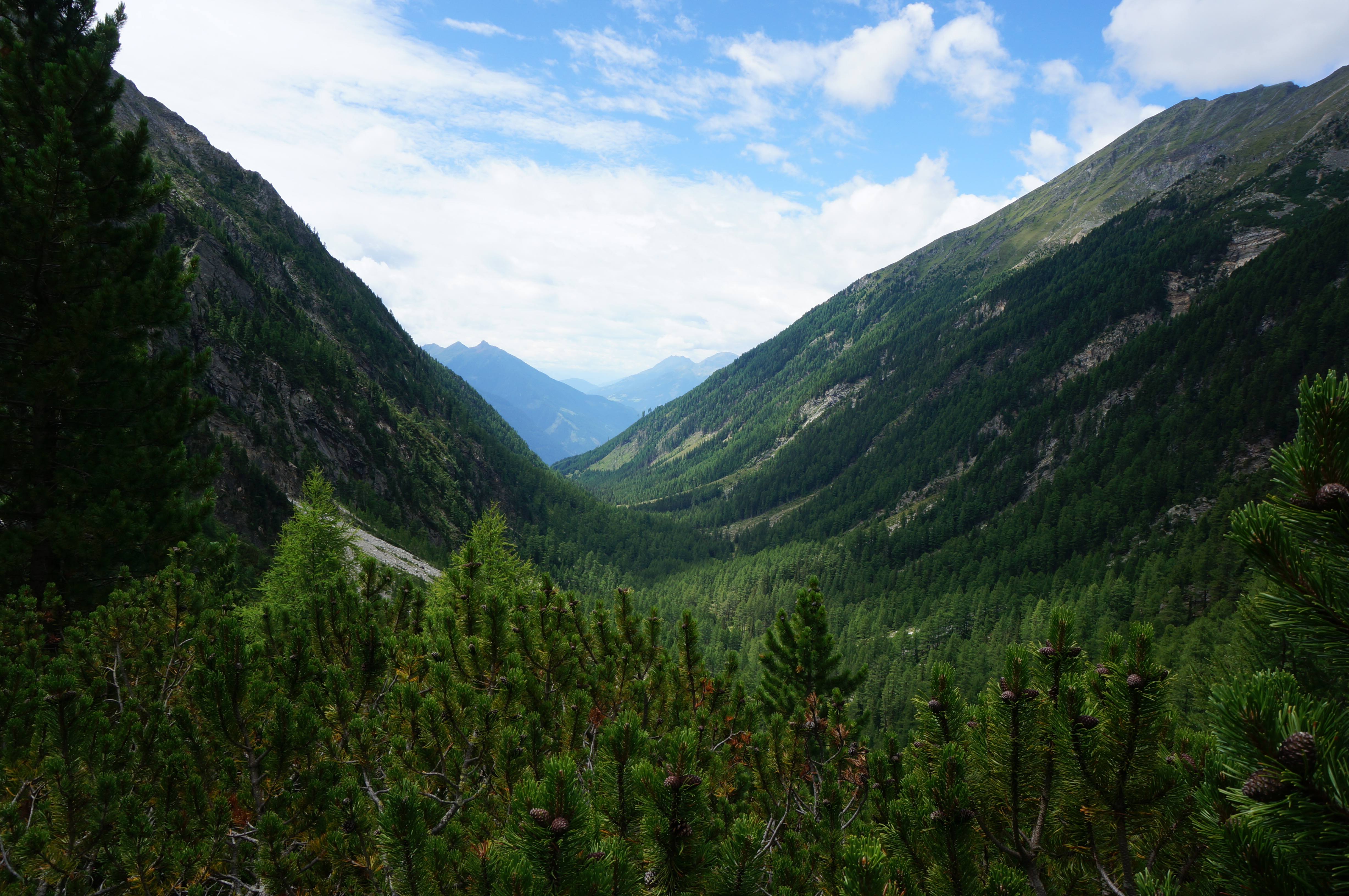 Kaponigtal, ein Seitental des Mölltales in der Gemeinde Obervellach Bezirk Spittal an der Drau, im Nationalpark Hohe Tauern, Kärnten, Österreich, EU